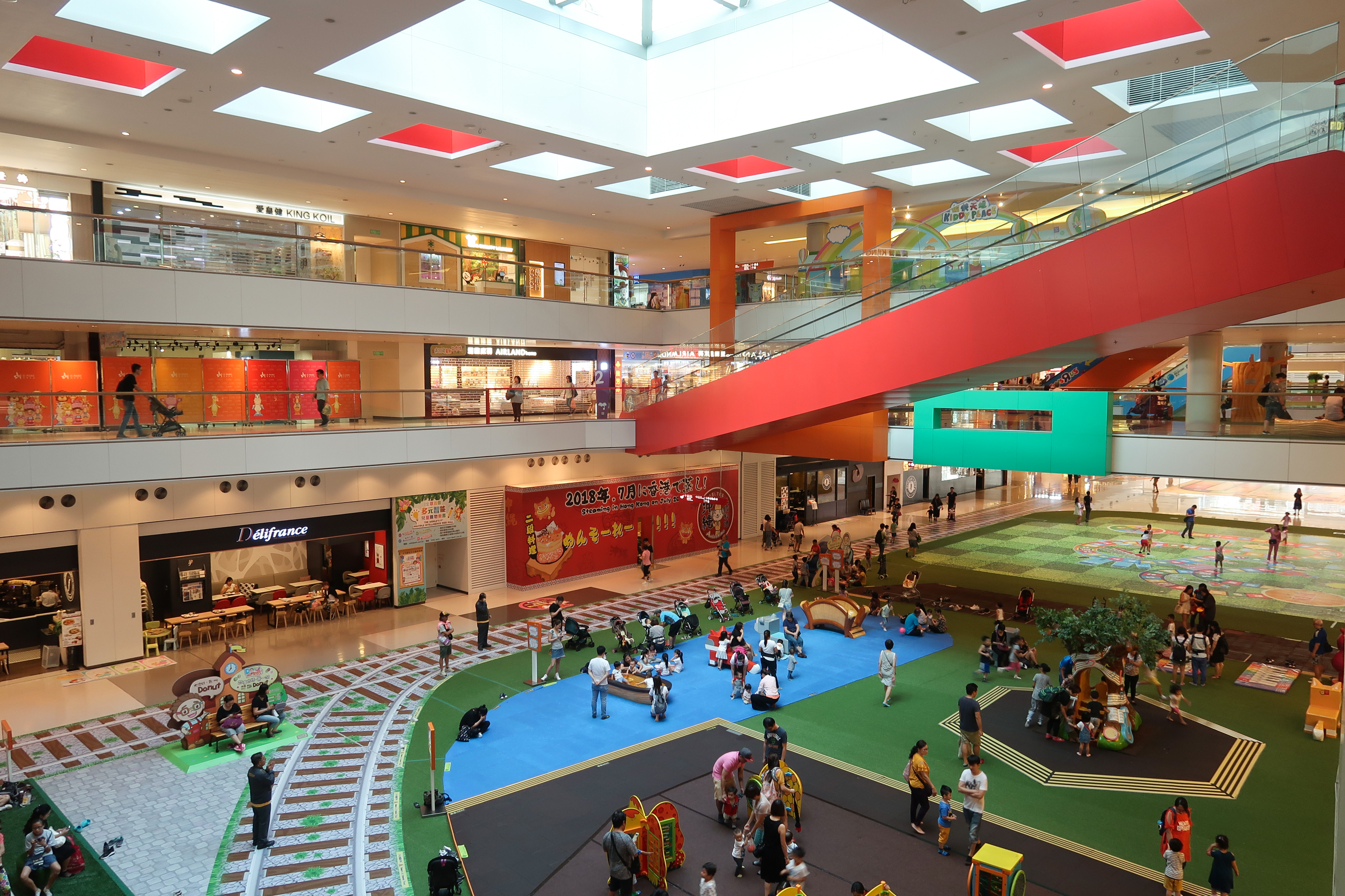 D Park Main Street